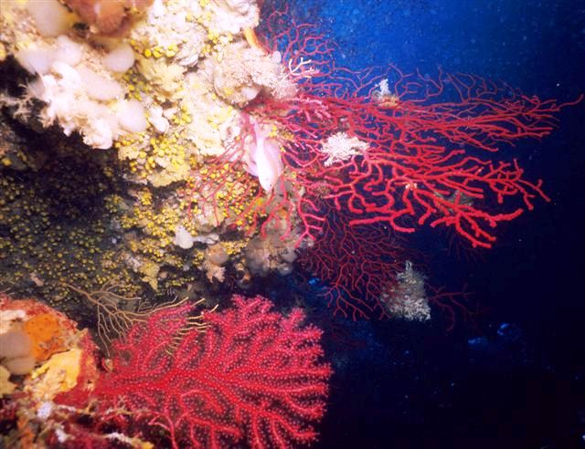 Finistruna, Area Marina Protetta Capo Gallo, Palermo, Sicily Paramuricea clavata (red), Leptopsammia pruvoti (yellow).